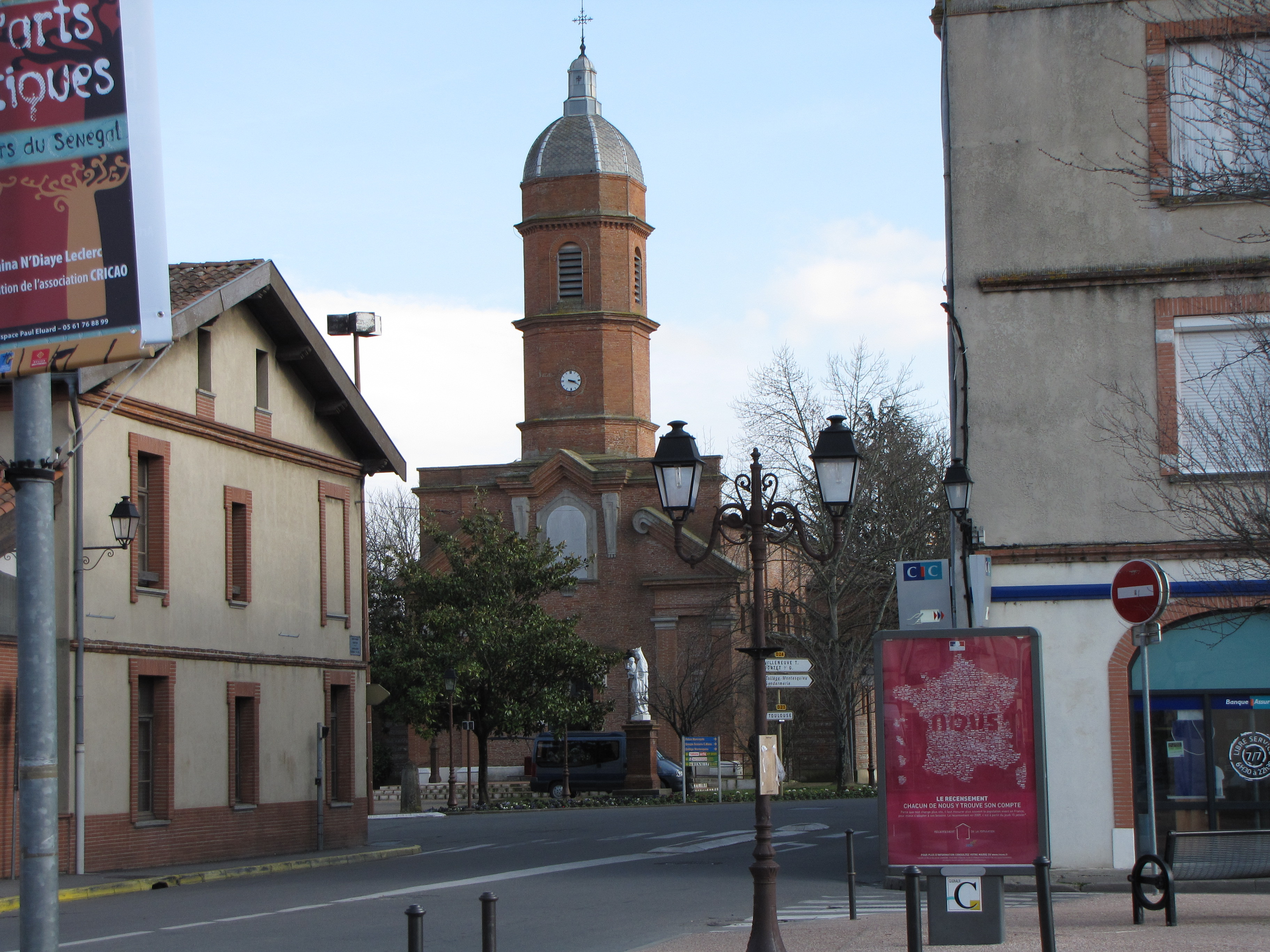 Cugnaux (Haute-Garonne, France).